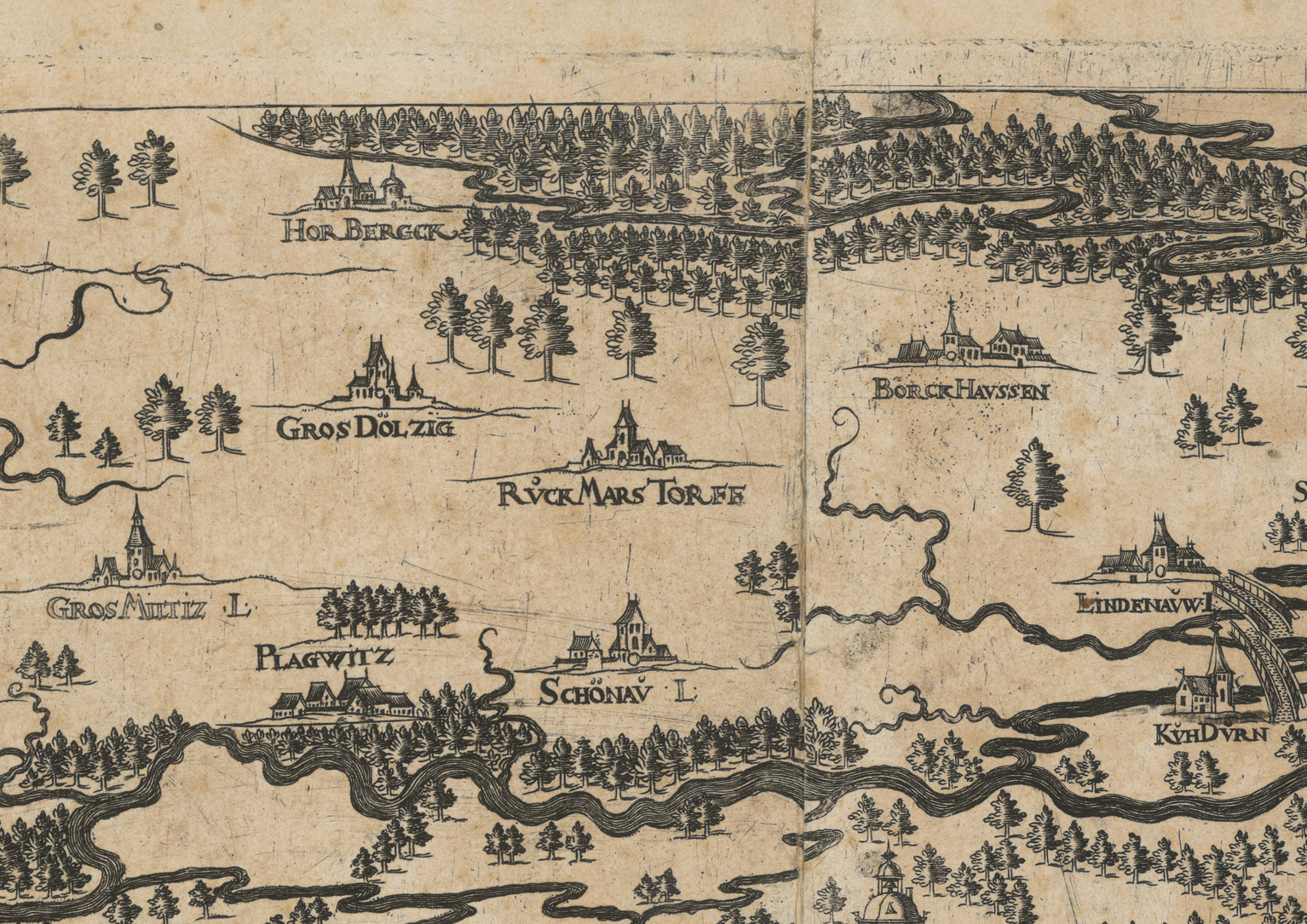 Ausschnitt aus "Genaue und wahrhafftige Beschreibung der sowohl wegen der Menge der Studien glänzenden, als auch durch die vielen Handelsgeschäfte wohlhabenden und blühenden Stadt Leipzig", Knobloch 1595.